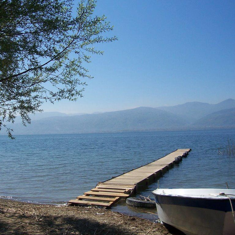 Aşağıdere Köy'ü Sapanca Gölü Sahilinden Bir Görüntü